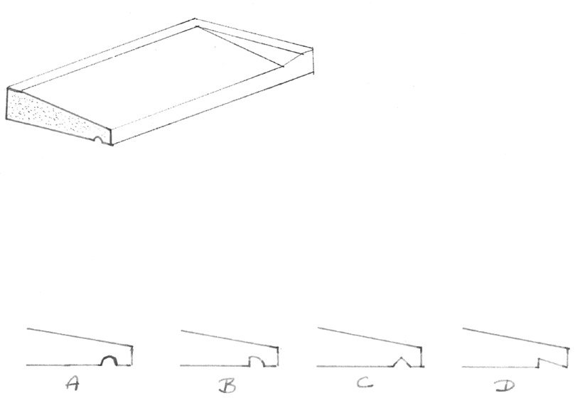 différents seuils de fenêtre ou de porte réalisés dans les règles de l'art, c'est-à-dire qu'ils ne laissent pas couler l'eau le long de la façade et former des traces humides mais la rejettent le plus loin possible Dessiné par utilisateur:vahuge et mise dans le domaine public